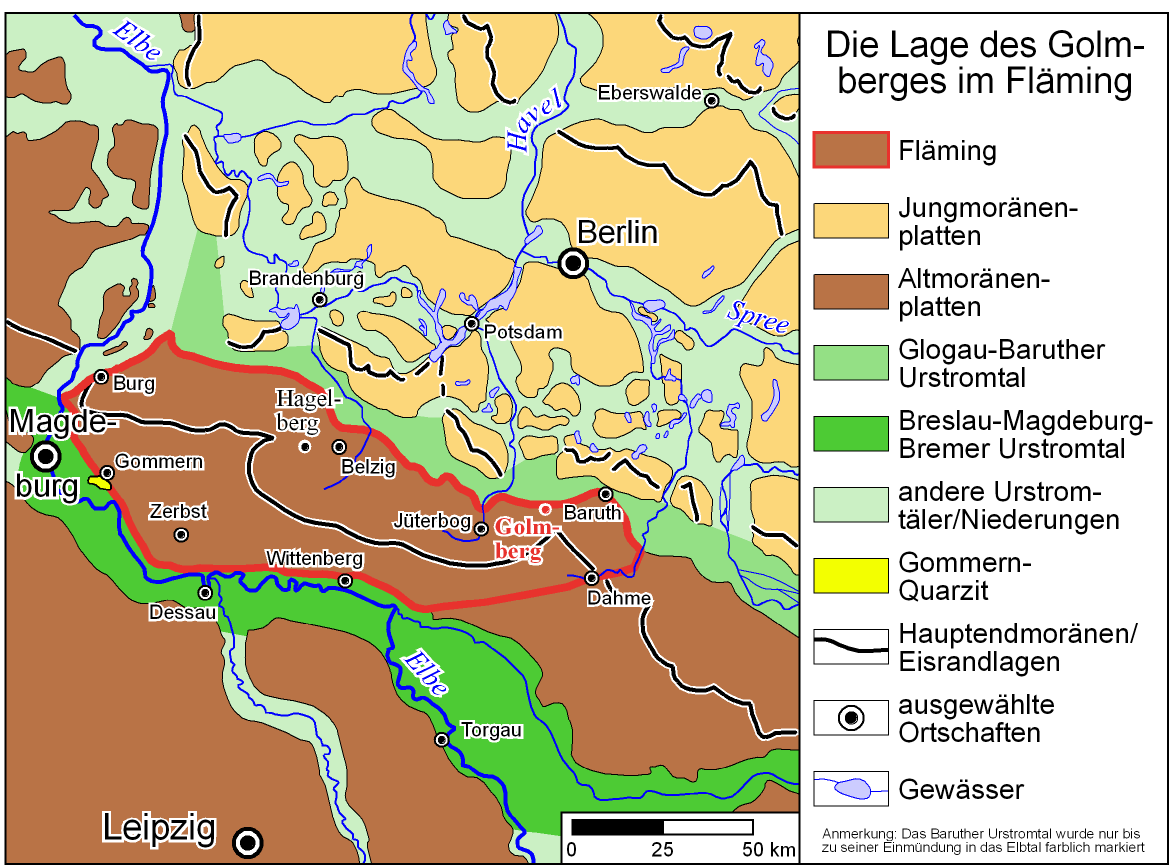 Karte: Die Lage des Golmberges im Fläming